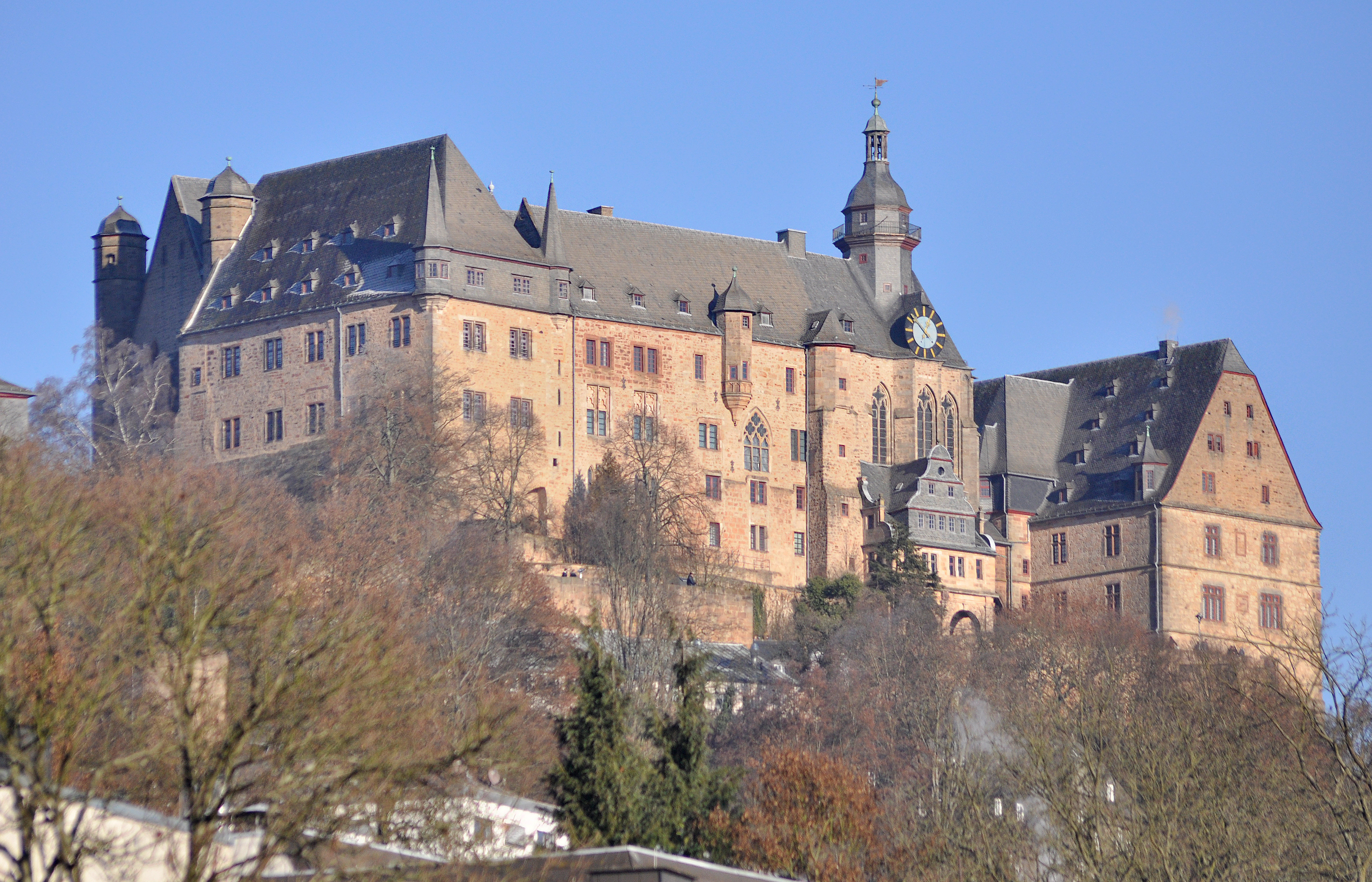 Landgrafenschloss in Marburg. Ansicht von der Universitätsstraße (von Südwesten).